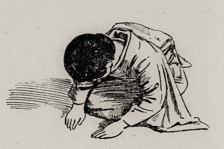 座礼。座っての挨拶